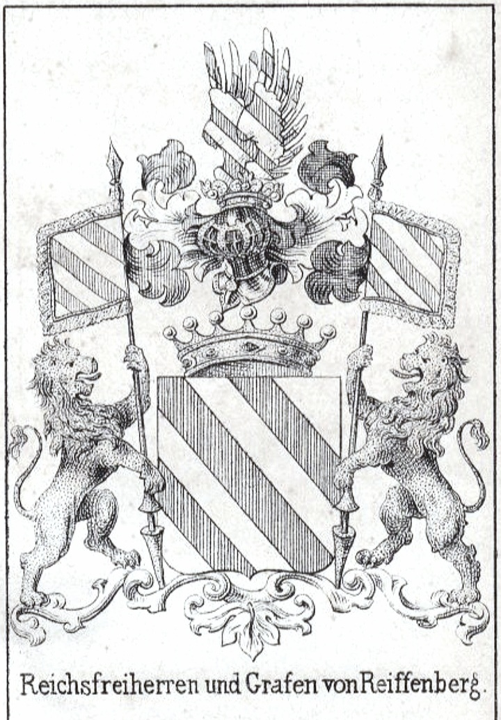 Wappen derer Reichsfreiherren und Grafen von Reiffenberg.